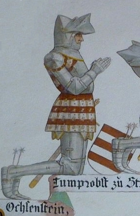 Schlachtkapelle Sempach: Johann Ochsenstein